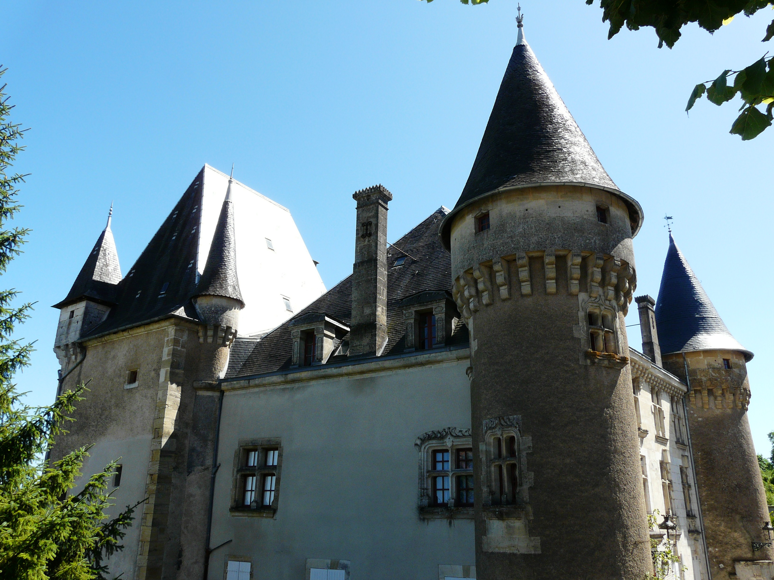 Le château de Vaucocour, Thiviers, Dordogne, France